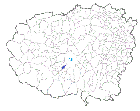 Posizione del comune nella provincia di Cuneo